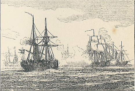 Korvetten "Valkyrien" i kamp med tyske dampskibe 1849.